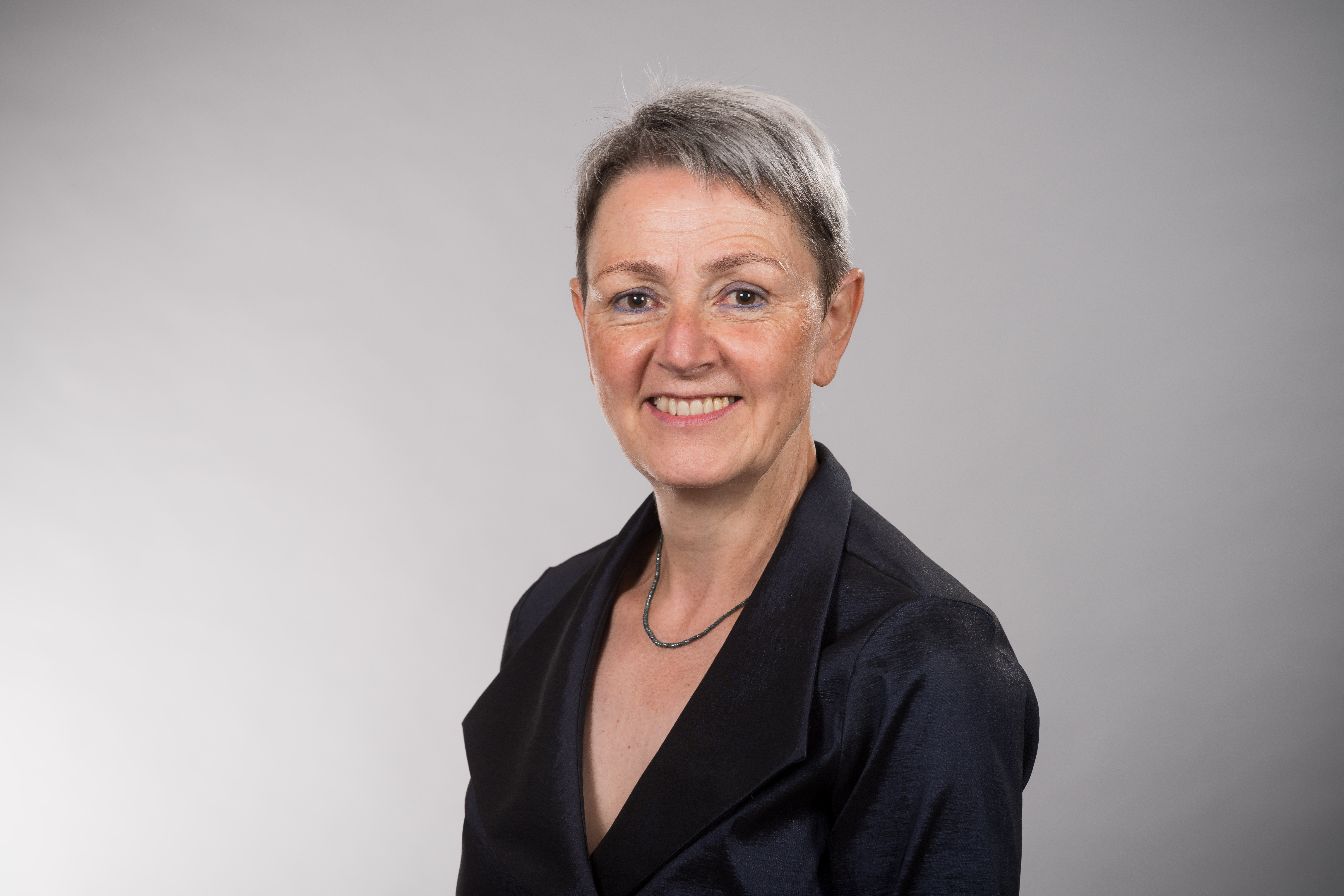 Dr. Ute Maier ist Vorstandsvorsitzende der KZVBW